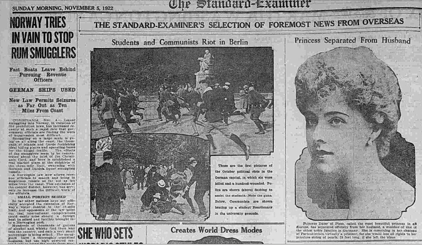 the standard examiner, ogden,utah 5.11.1922